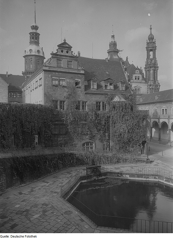 Original image description from the Deutsche Fotothek Dresden. Pferdeschwemme auf dem langen Söller des Stallhofes gegen Kanzleihaus